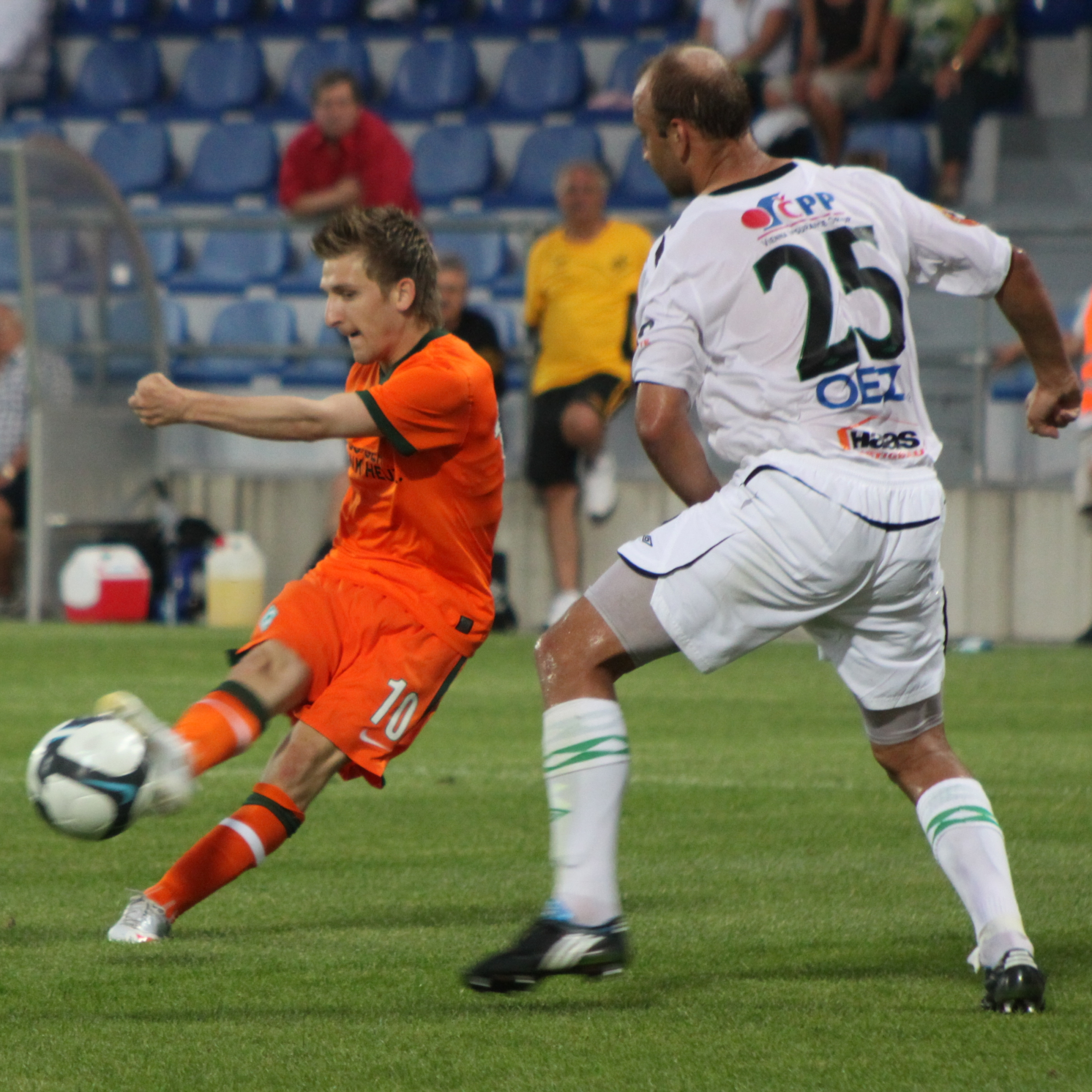 Marko Marin (SV Werder Bremen) gegen Pavel Drsek (FK Jablonec)